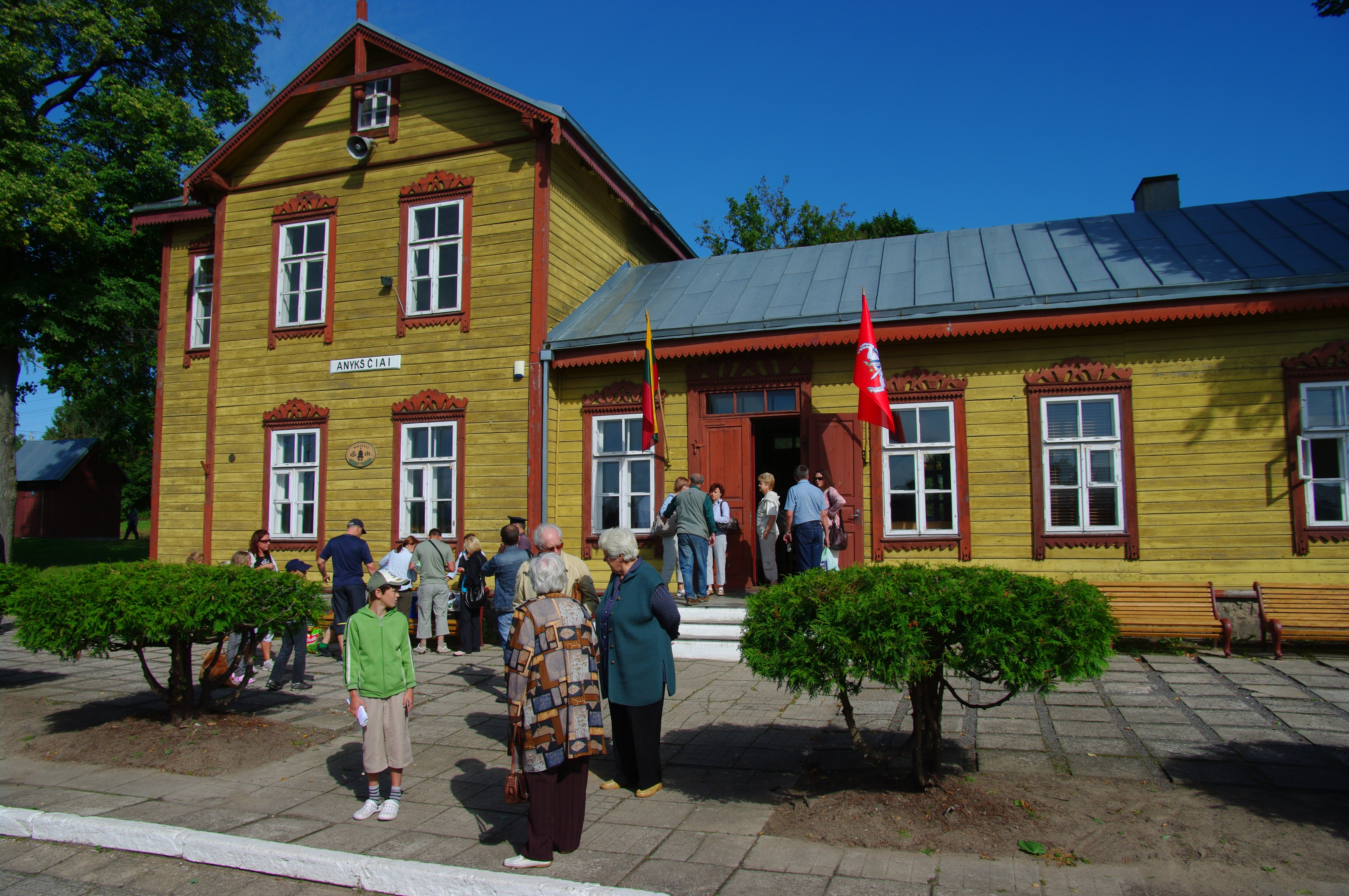 Narrow gauge railway - Anykščiai railway station (2) (